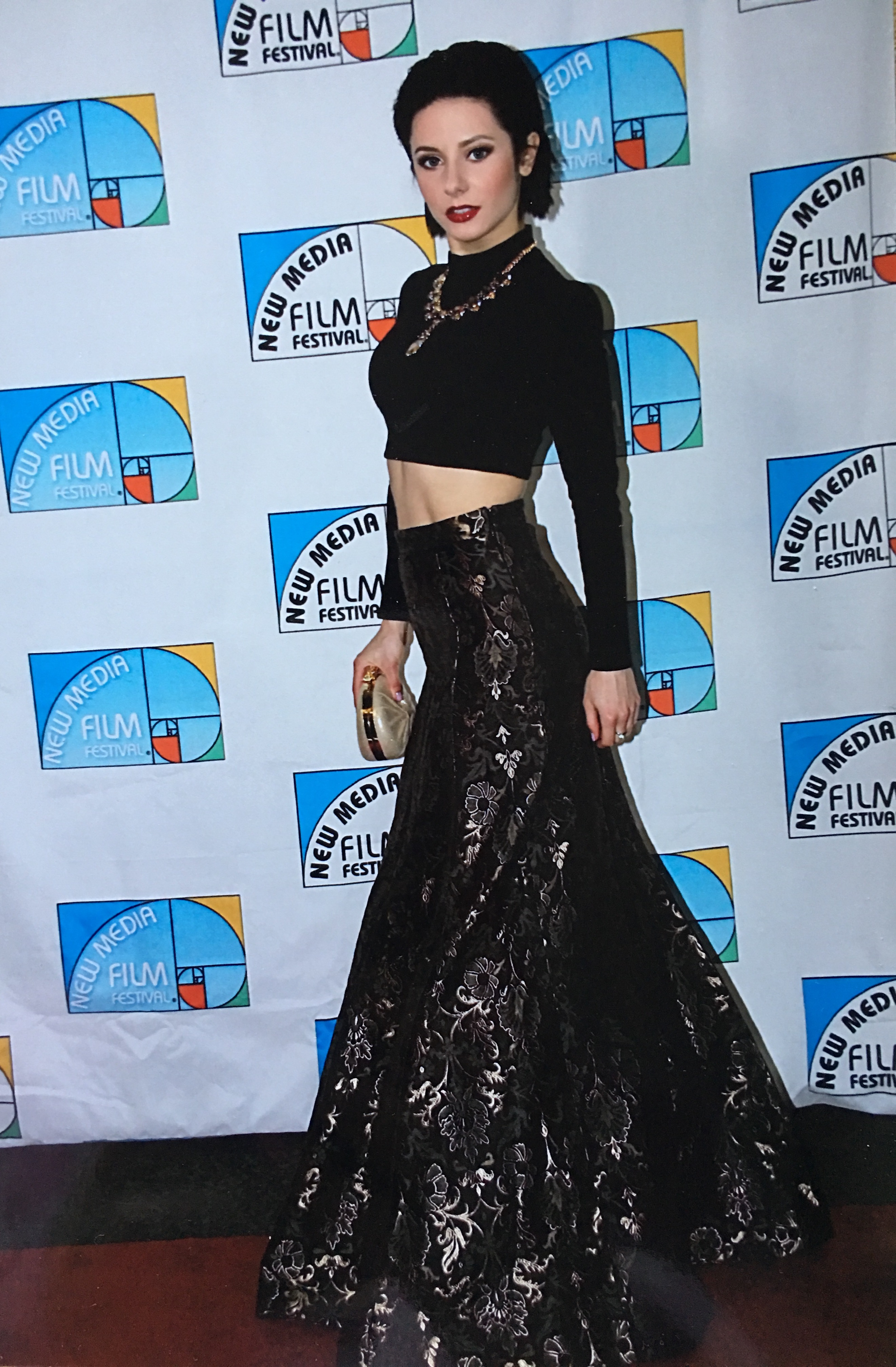 Princess X на кинофестивале в Голливуде 2018